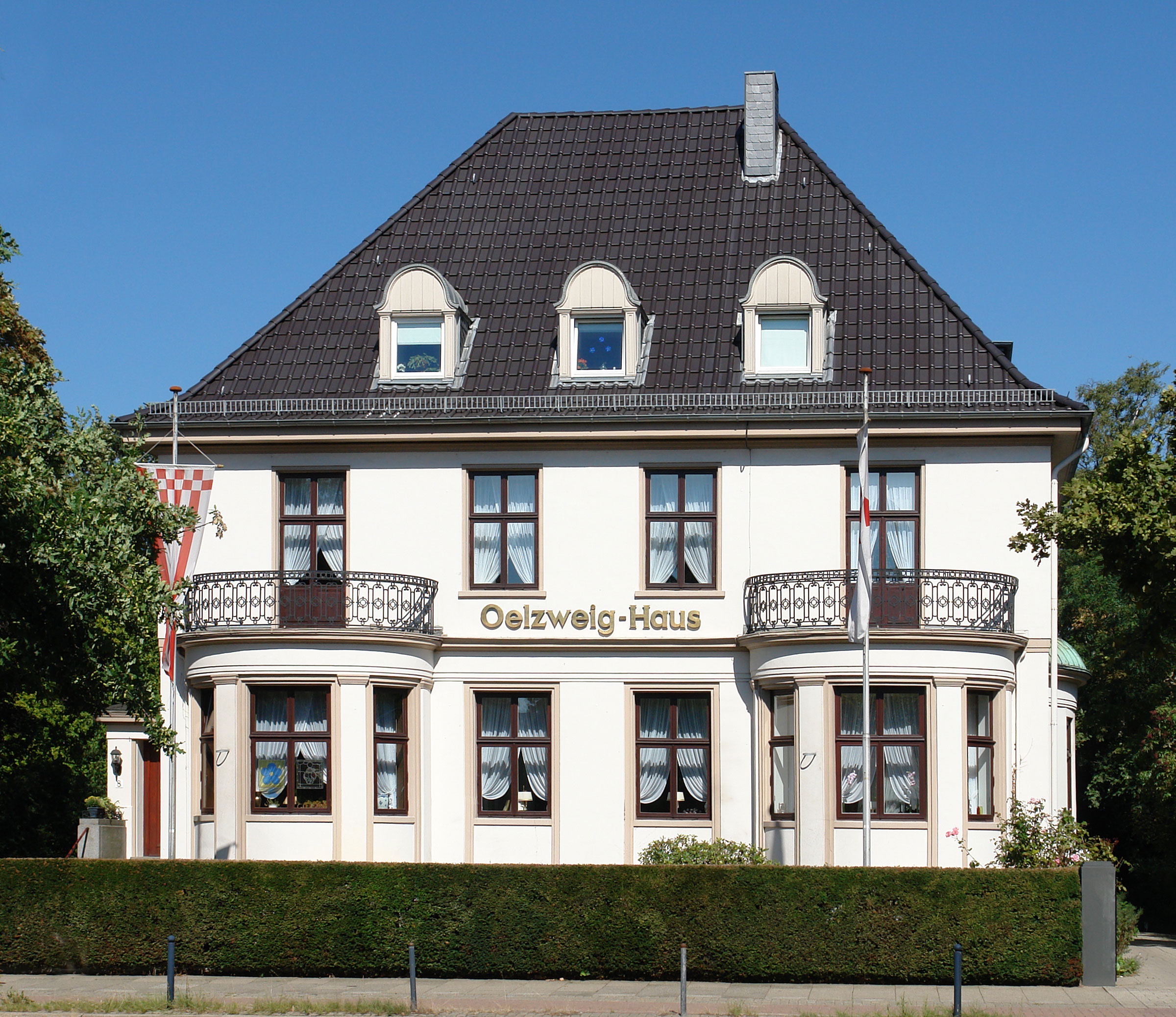 Oelzweig-Haus in Bremen, Kurfürstenallee 8Das abgebildete Objekt ist ein geschütztes Kulturdenkmal in der Freien Hansestadt Bremen, mit der Nr. 3480 beim Landesamt für Denkmalpflege registriert.